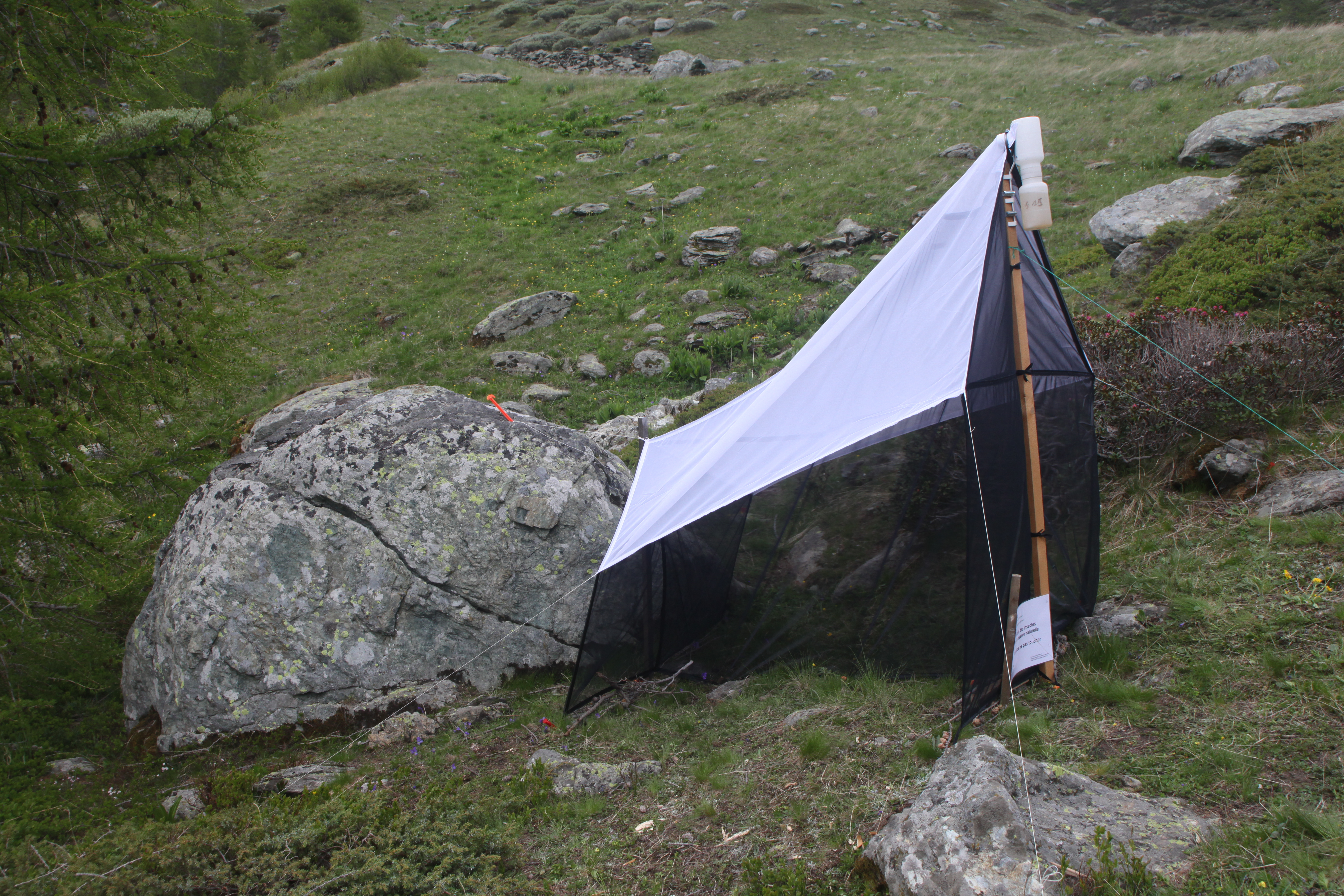 Tente malaise dans la RNN de Ristolas - Mont Viso.